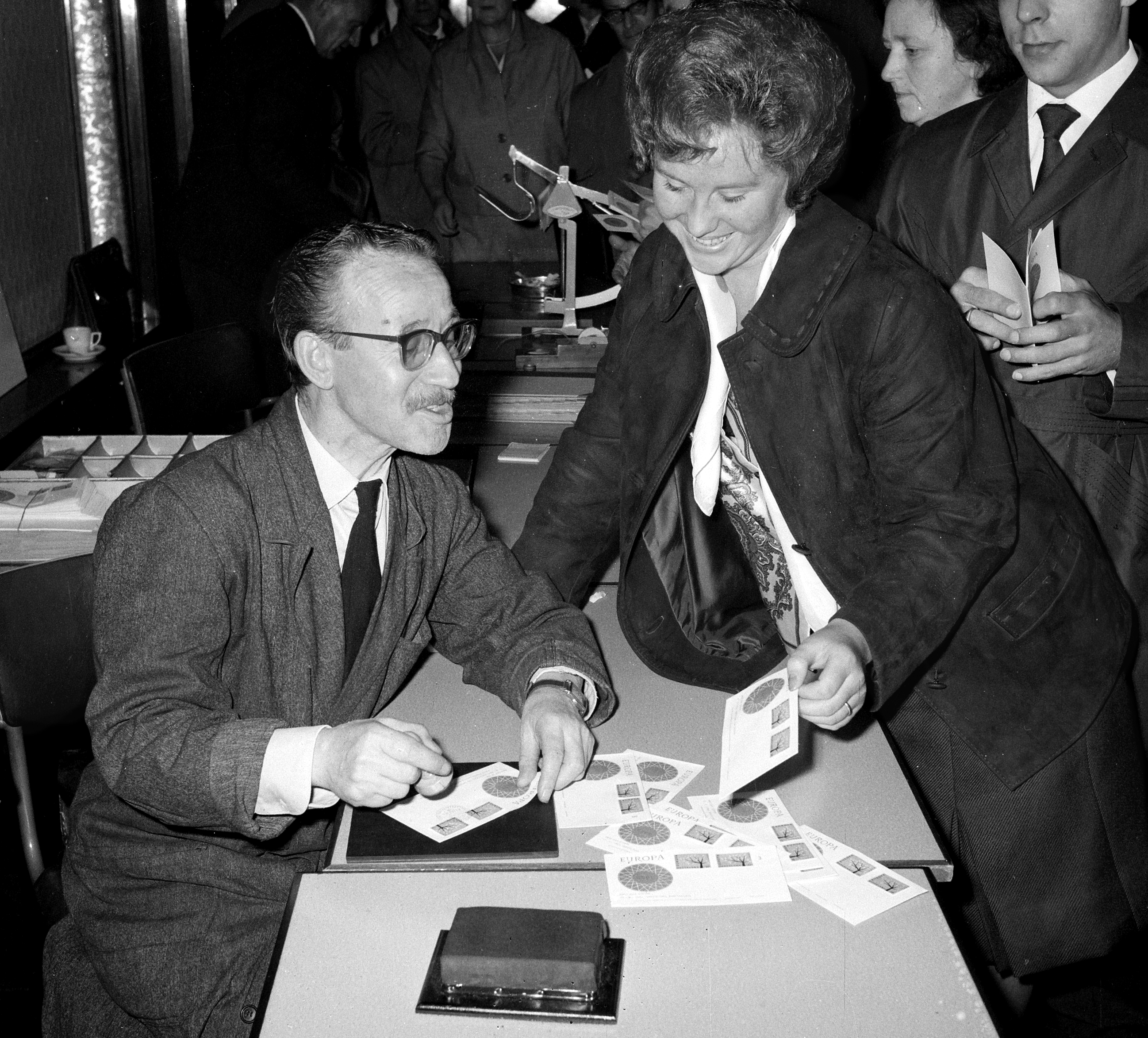 Collectie / Archief : Fotocollectie Anefo Reportage / Serie : [ onbekend ] Beschrijving : Europa-zegels in Krasnapolski, filatelistenbeurs geopend Datum : 17 september 1962 Locatie : Amsterdam, Noord-Holland Trefwoorden : FILATELISTEN, beurzen Instellingsnaam : Krasnapolski Fotograaf : Nijs, Jac. de / Anefo Auteursrechthebbende : Nationaal Archief Materiaalsoort : Negatief (zwart/wit) Nummer archiefinventaris : bekijk toegang 2.24.01.03 Bestanddeelnummer : 914-3190